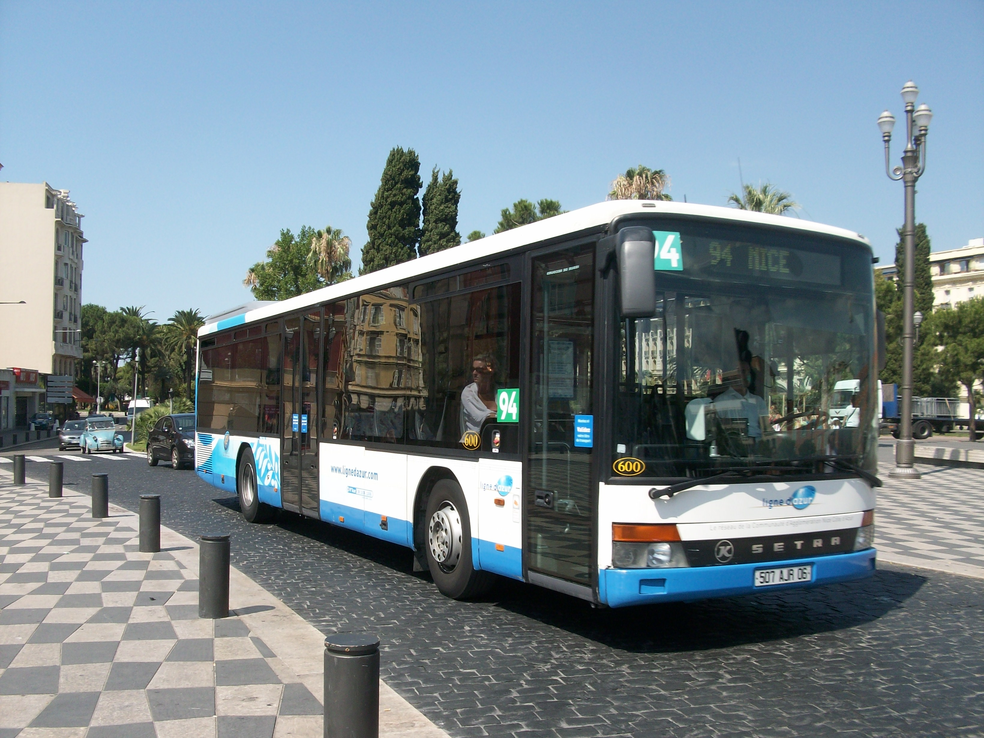 Setra S 315 NF à Nice